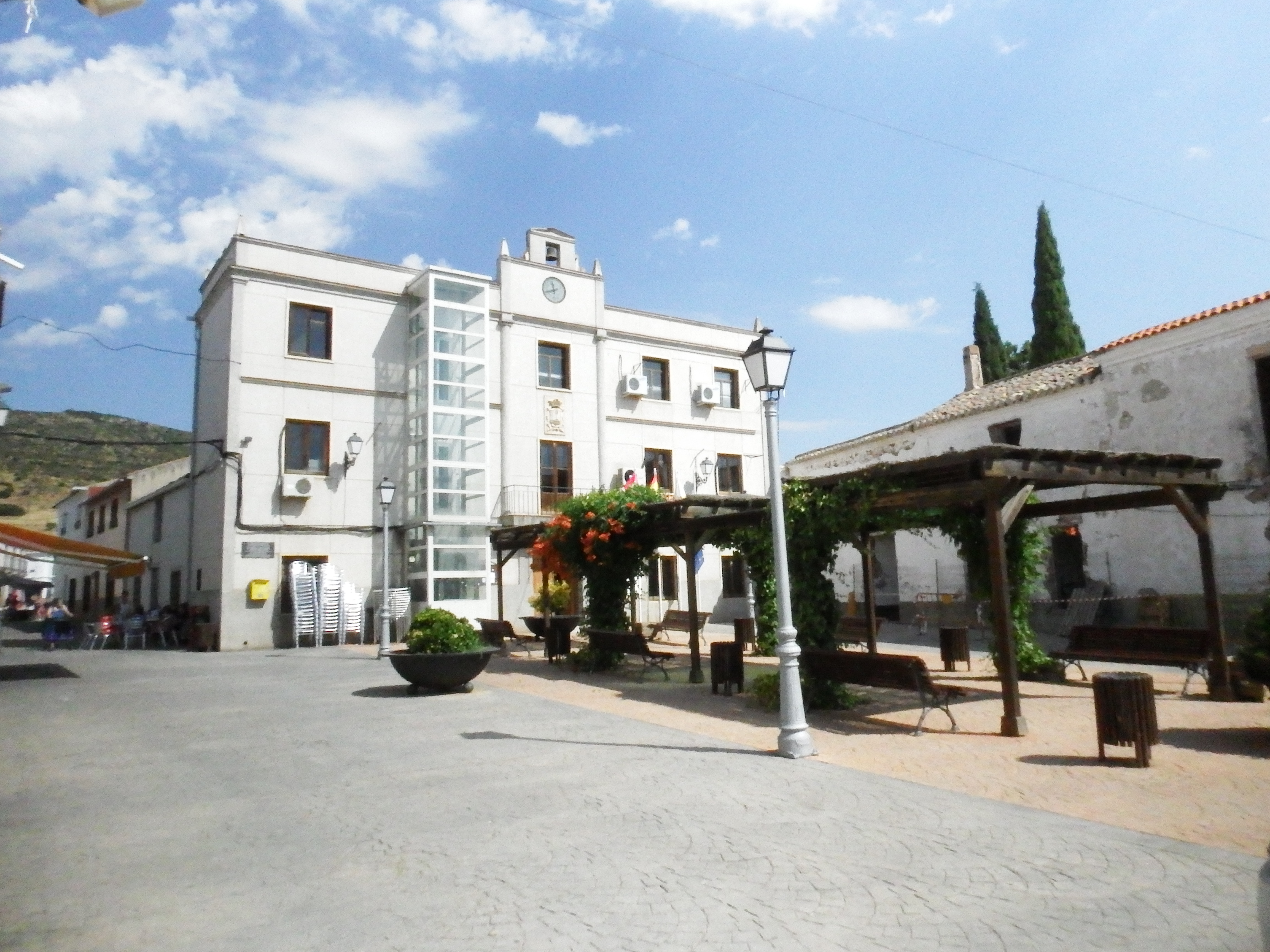 Villamayor de Calatrava, Ayuntamiento.